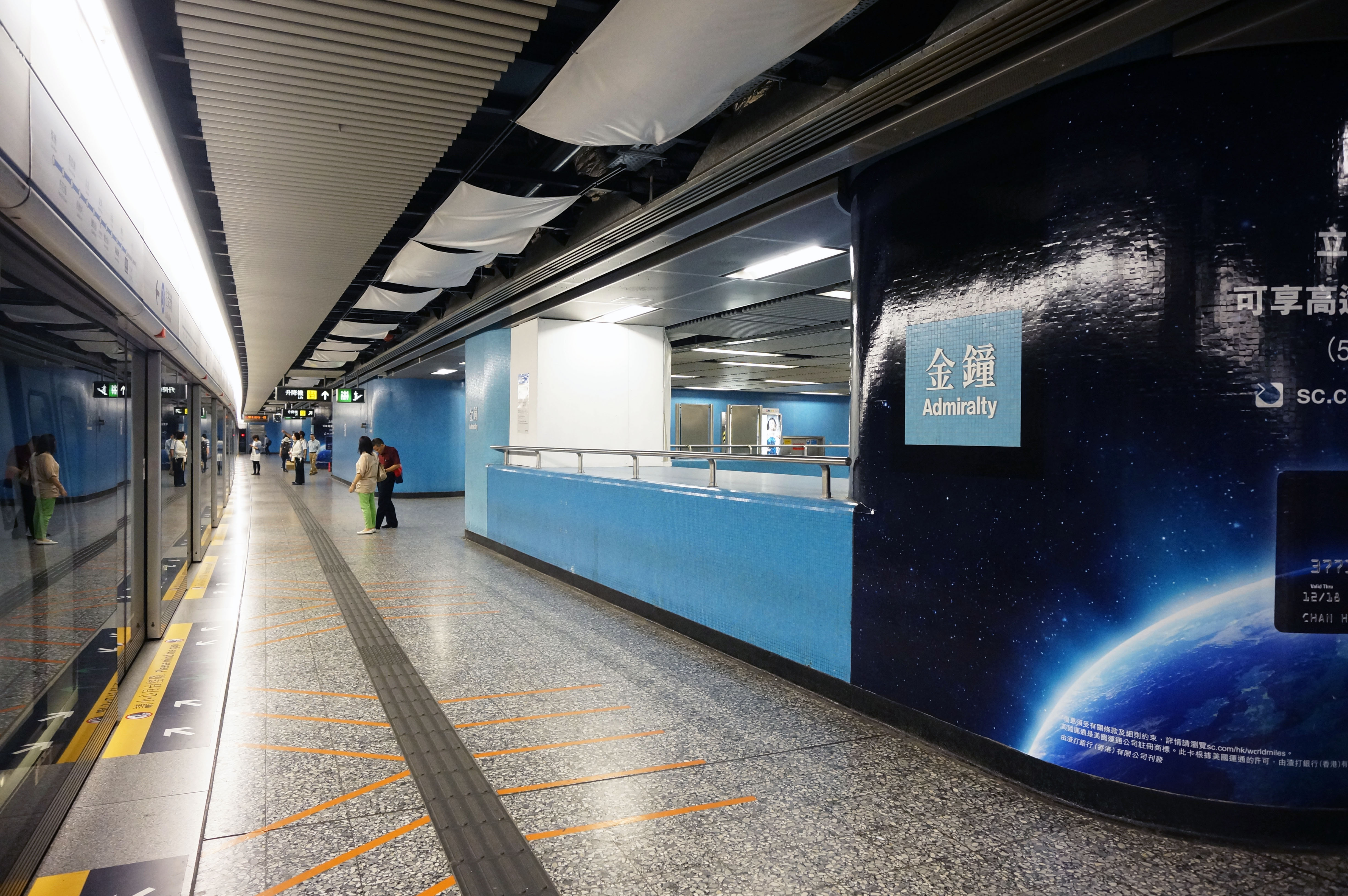 港鐵金鐘站月台